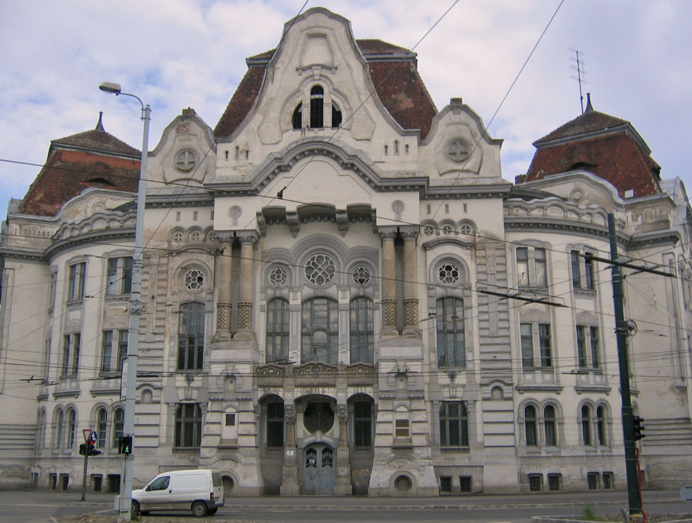 Cladirea Liceului Piaristilor din Timisoara